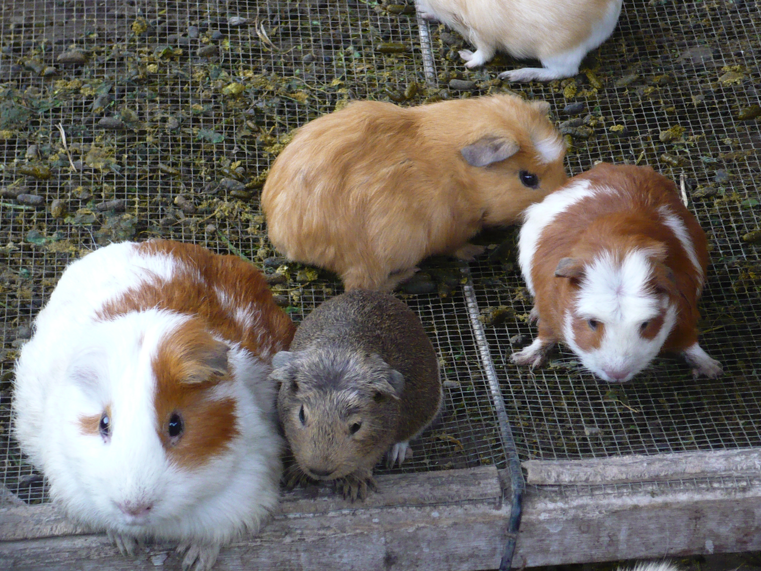 cuatro cuyes en Huaca Pucllana, Miraflores, Lima, Peru